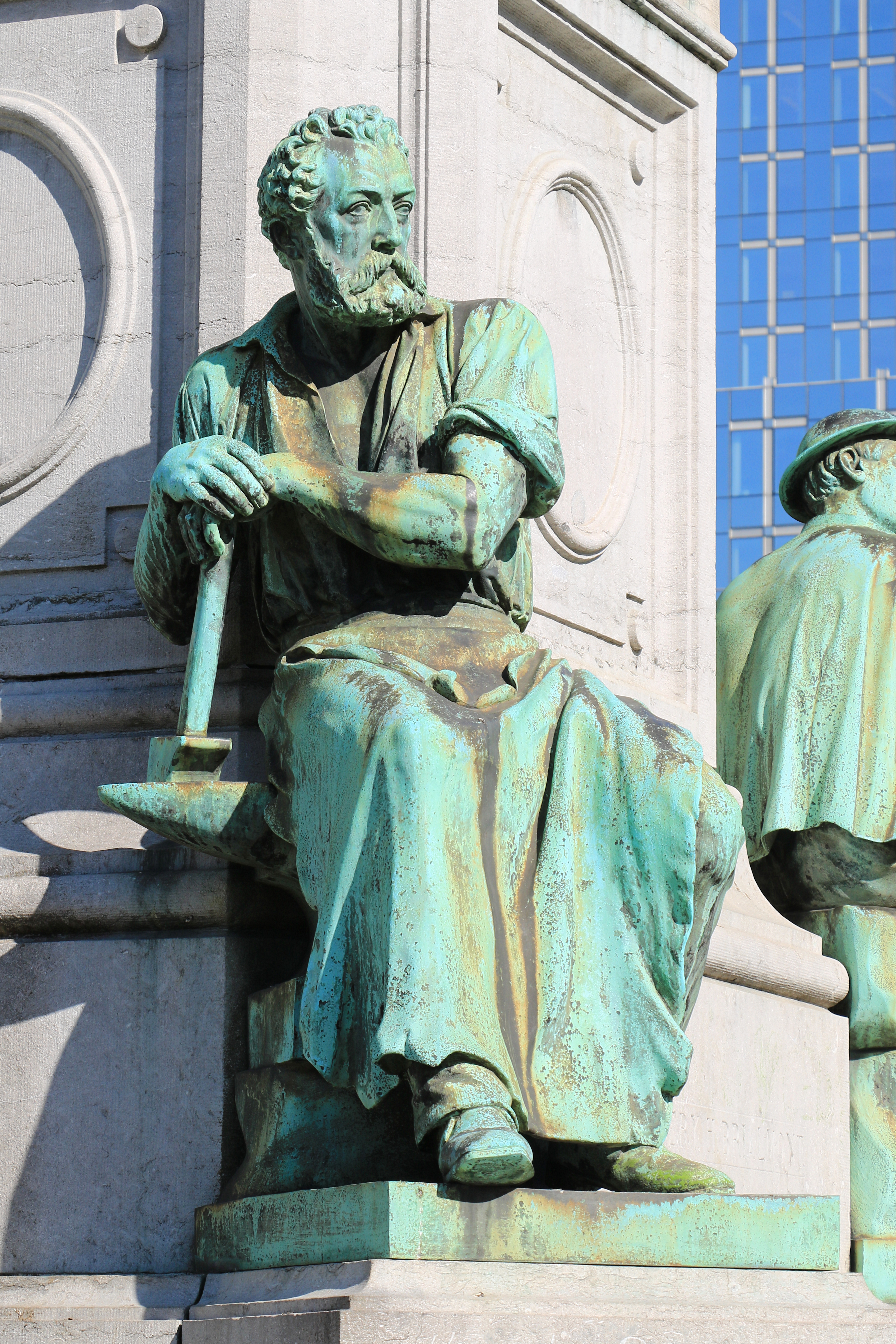 Belgique - Bruxelles - Ixelles - Place du Luxembourg - Monument à John Cockerill (1872) - Le forgeron This photo of immovable heritage has been taken in the Brussels Capital Region